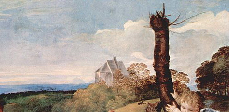 Tizian 002 landscape.jpg (Пейзаж з церквою на картині 1514 р.)